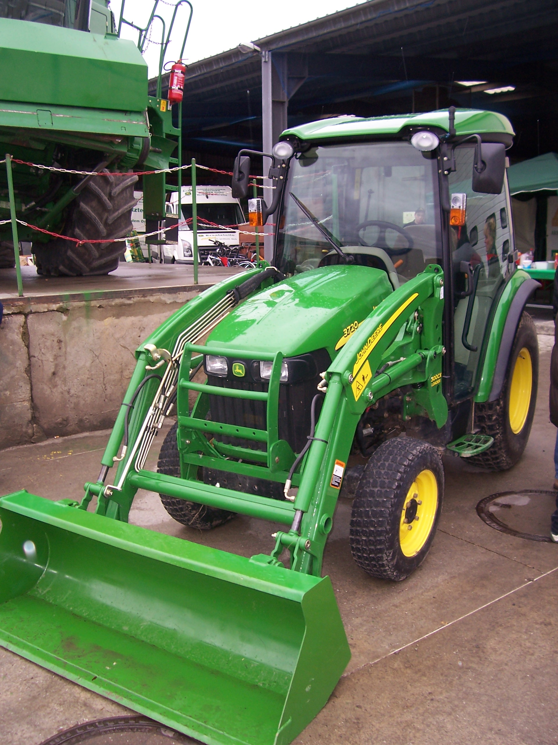 Kleintraktor John Deere 3720 mit John Deere 300CX Frontlader